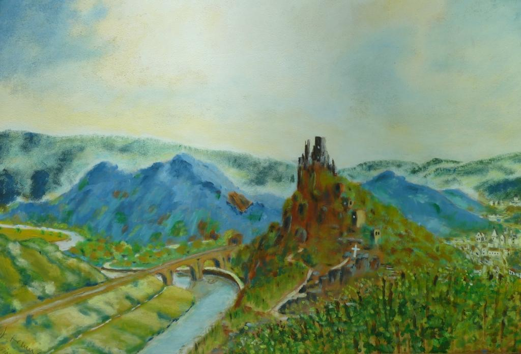 Felsformation Um die Burg Are und Blick ins Langfigtal um 1904